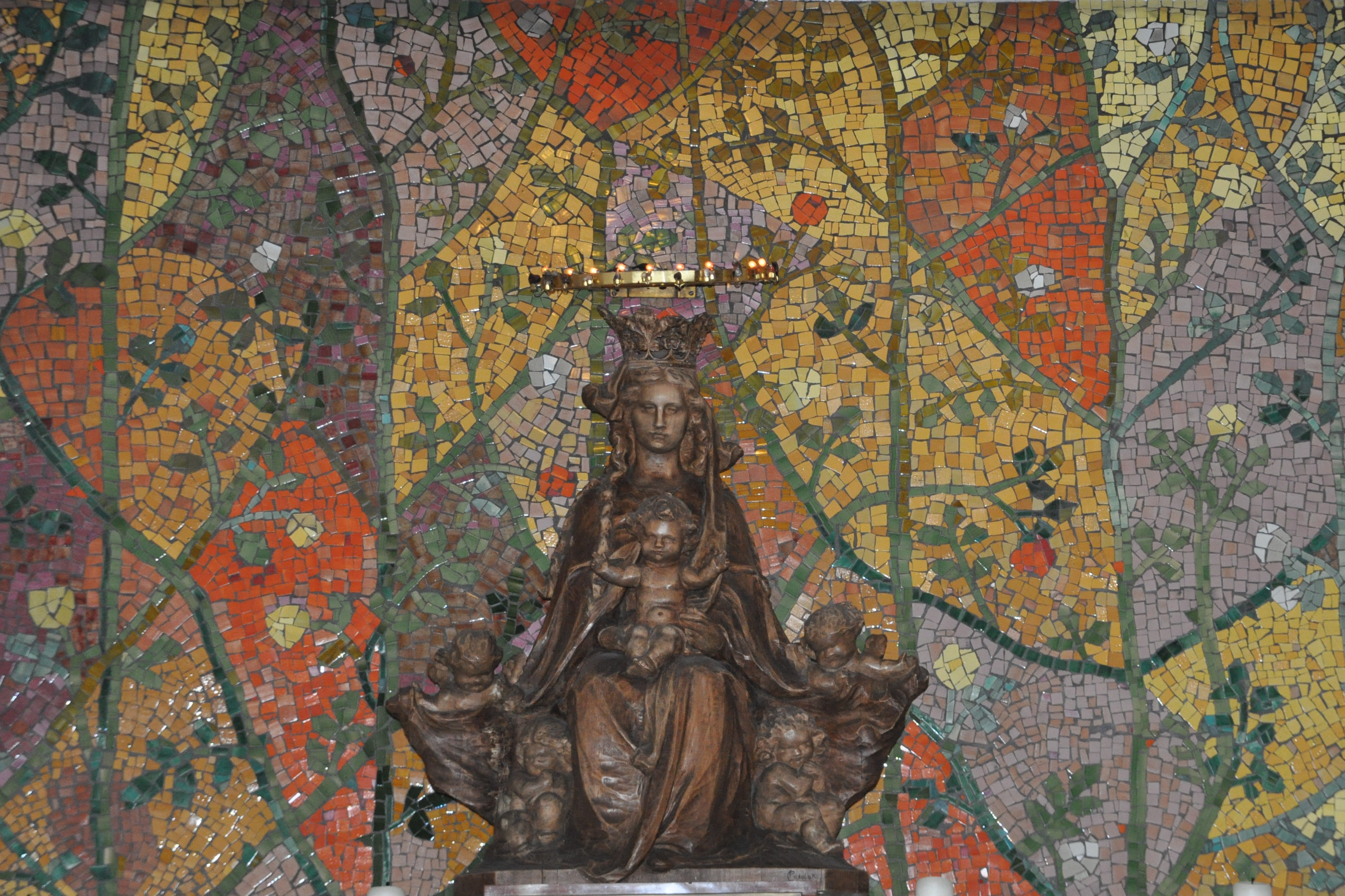 Marienaltar der Pfarrkirche Christkönig, Linz. Mosaik von Hans Babuder